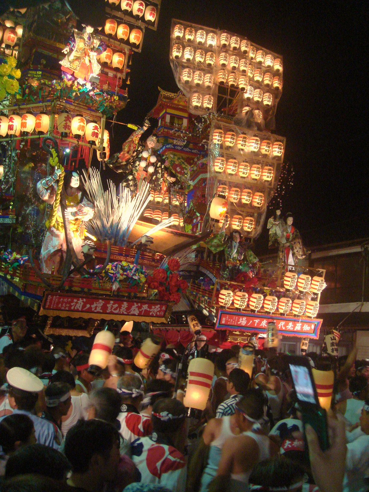 日田祇園祭山鉾巡行行事札の辻晩山（隈・竹田地区）の様子。山鉾は、大和町山鉾と三隈町山鉾。